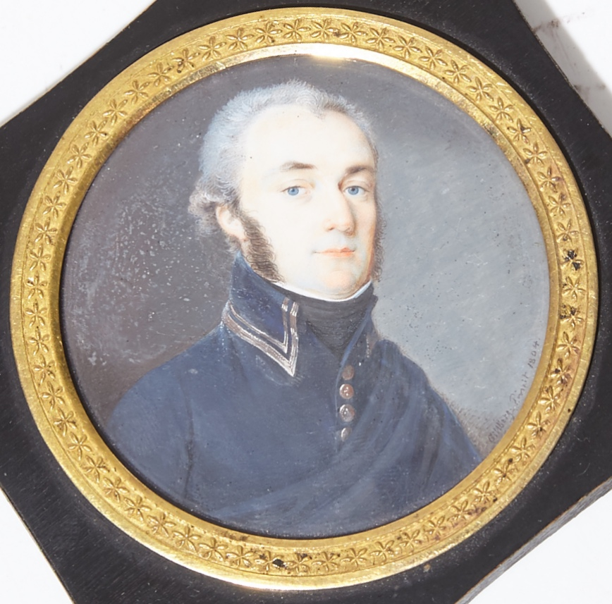 Porträtt av Carl Gustaf Nordforss (1763-1832) iklädd uniform m/1802 för officer i generalstaben. Porträtt från 1804 av Jacob Axel Gillberg.